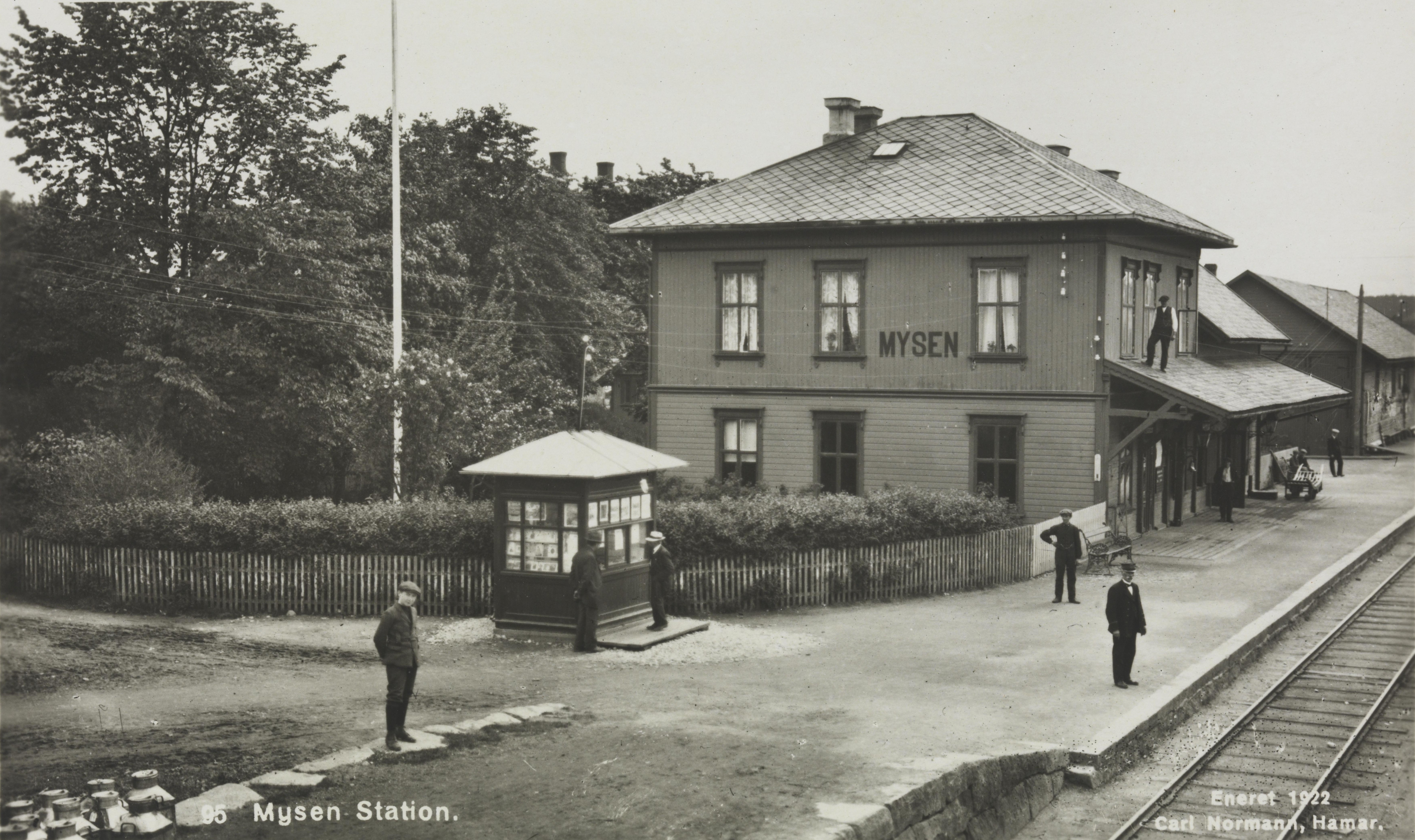 Gamle Mysen stasjon på Østfoldbanens Østre linje slik den så ut i 1922